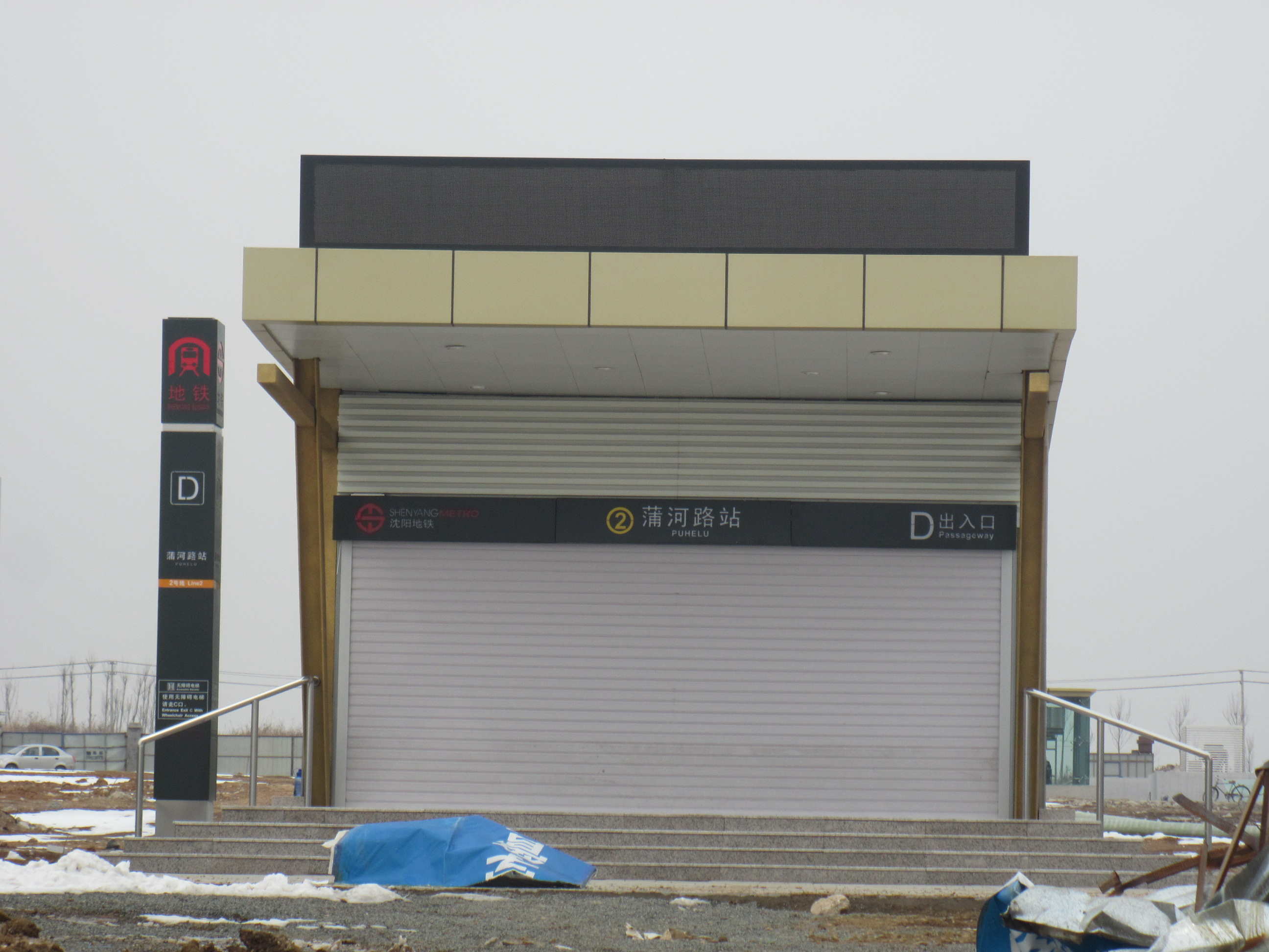 施工中的蒲河路站D出入口。